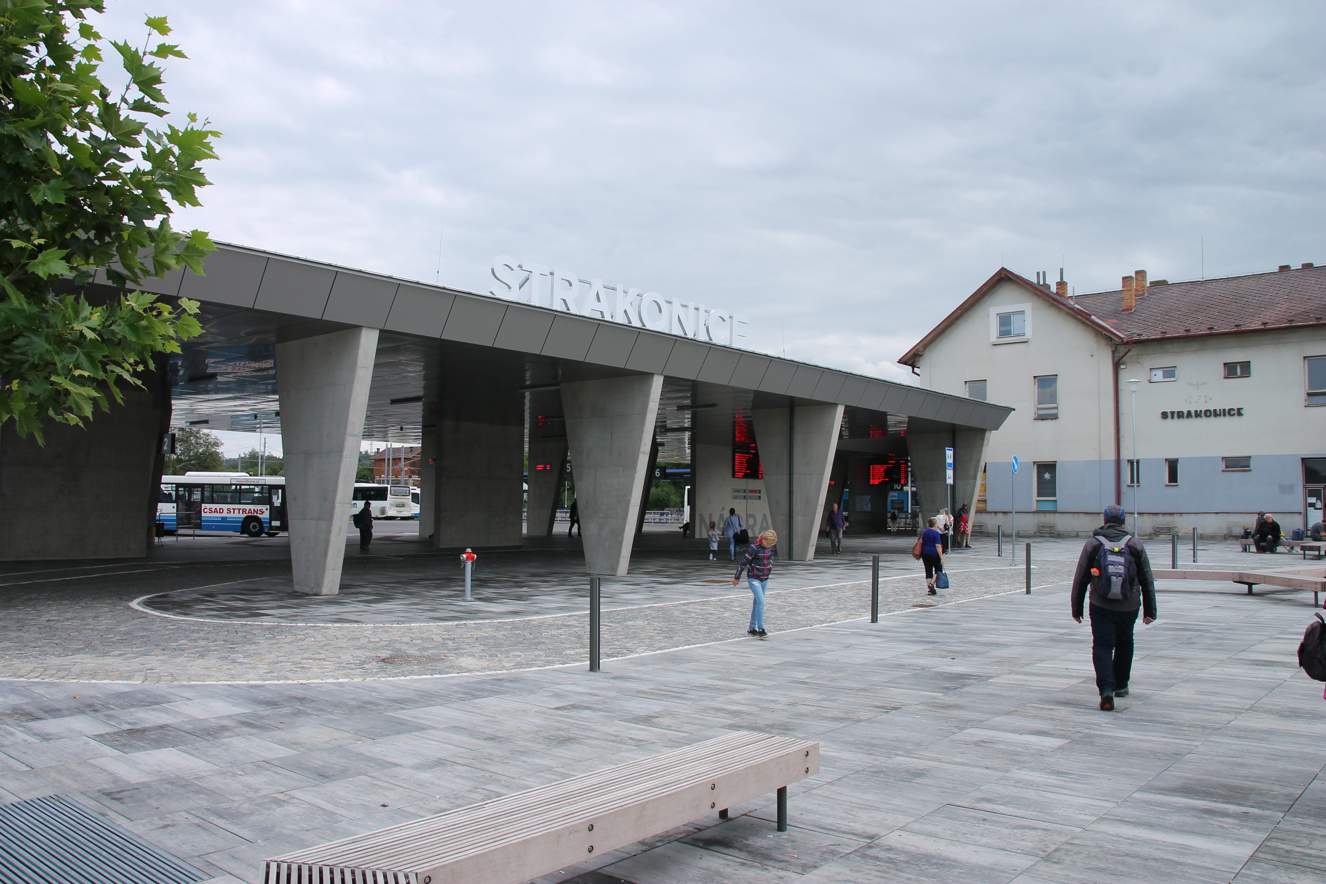 Nové autobusové nádraží ve Strakonicích – v provozu od prosince 2018